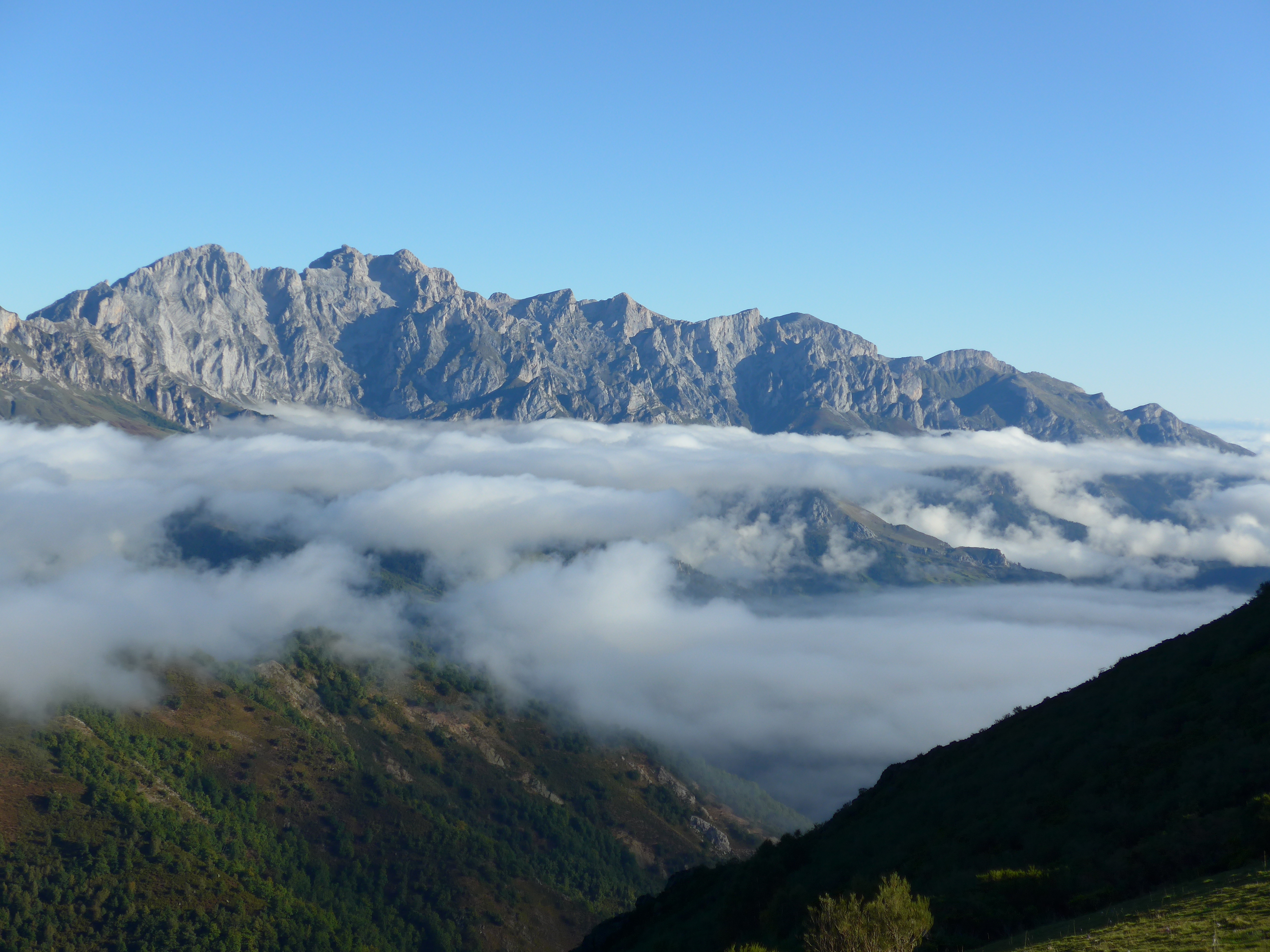 Macizo oriental de Picos de Europa contemplado desde el Collado de Llesba.